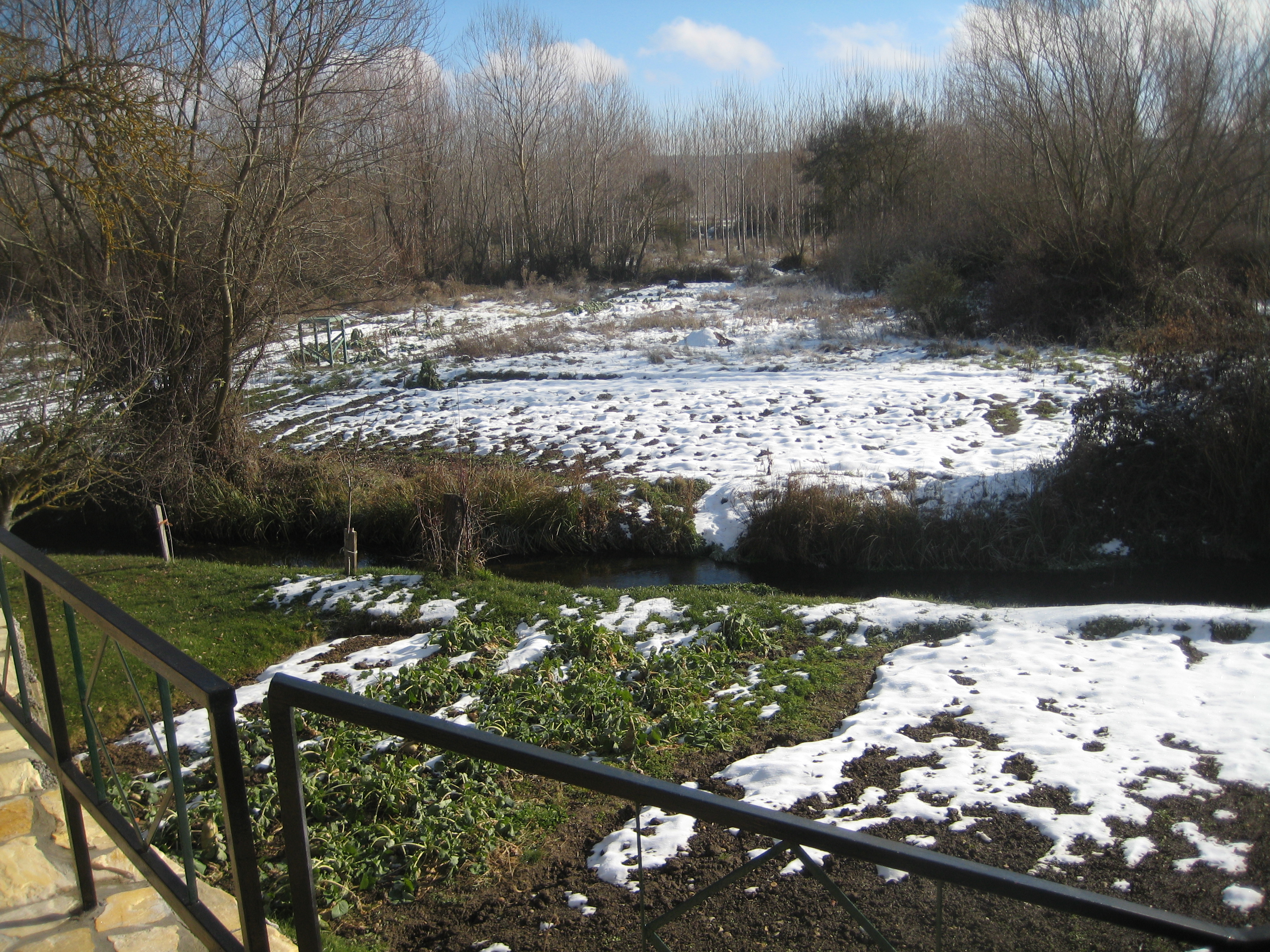 huerto Berzal, Diciembre 2010